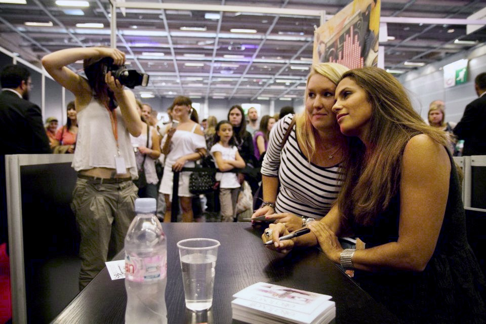 La chanteuse française Elisa Tovati en dédicaces à Music Expo 2011.